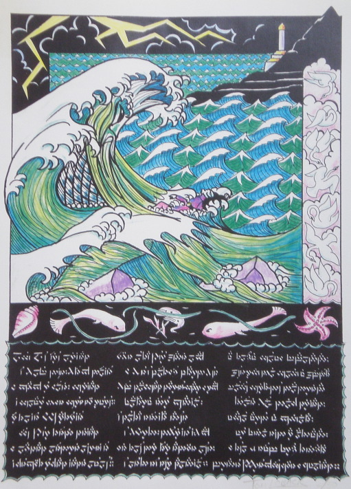 Ulmo saves Voronwe